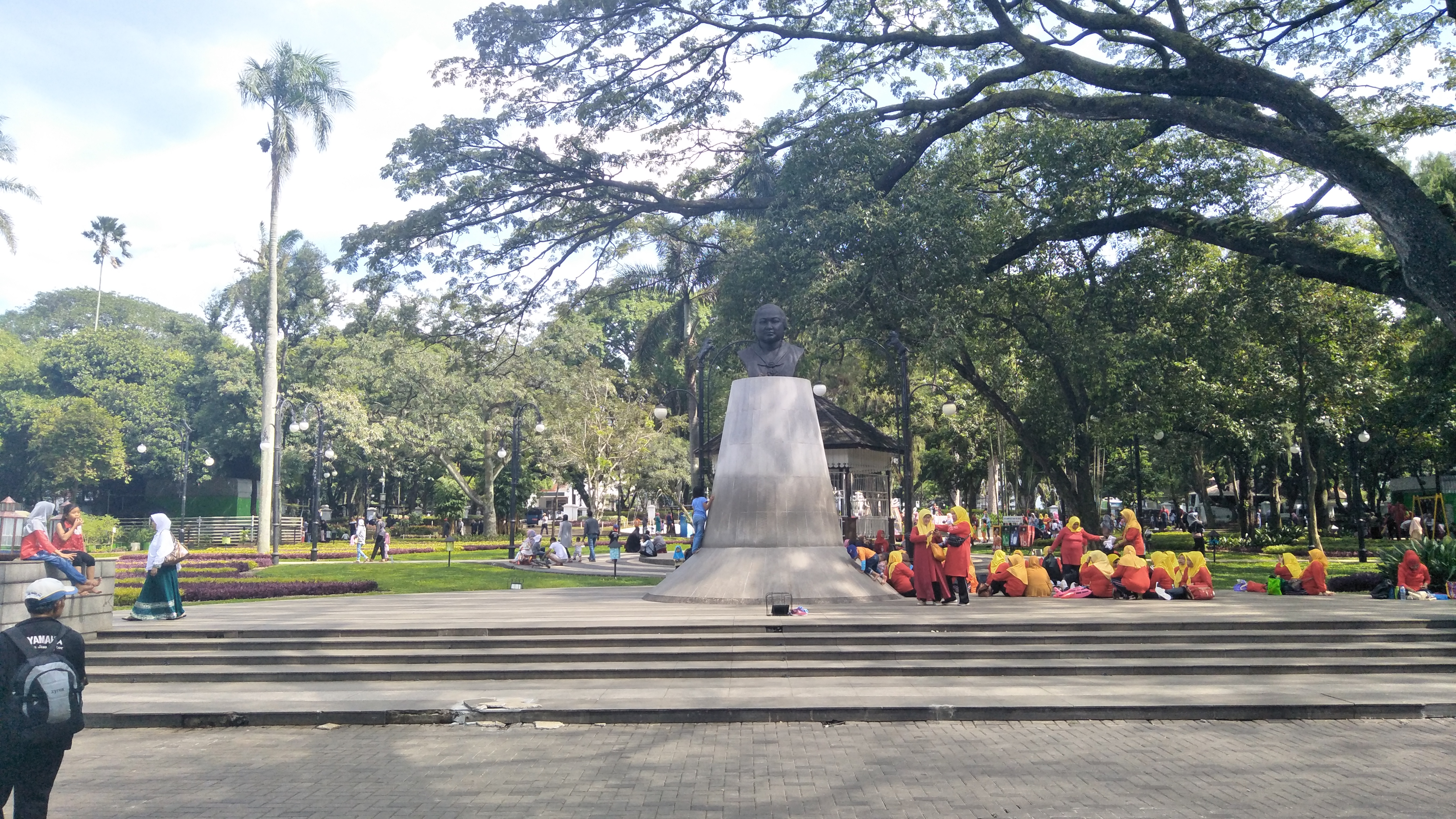 Taman Dewi Sartika